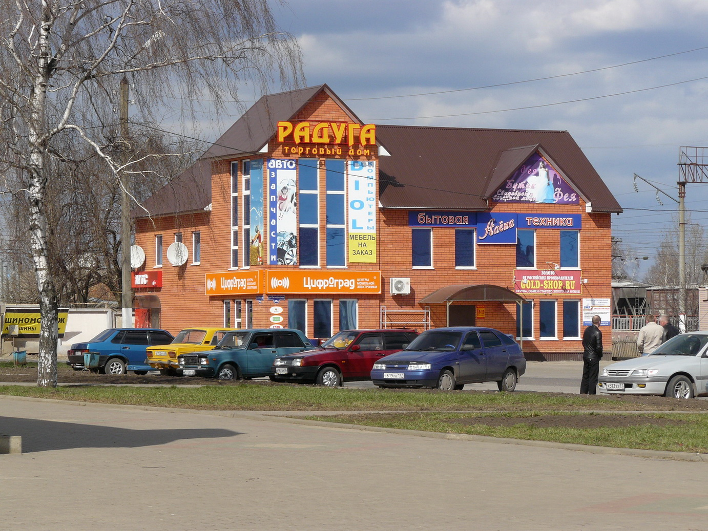 Торговый дом "Радуга", с. Тербуны